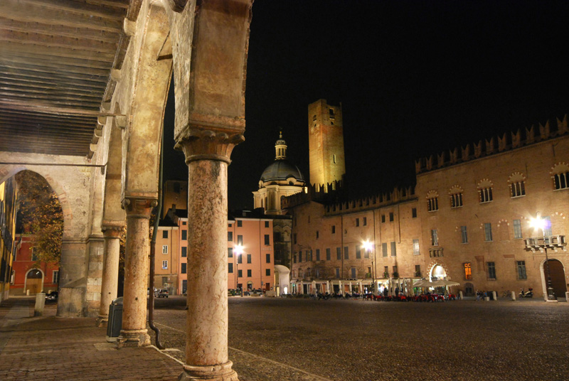 Mantova, Piazza Sordello di notte.